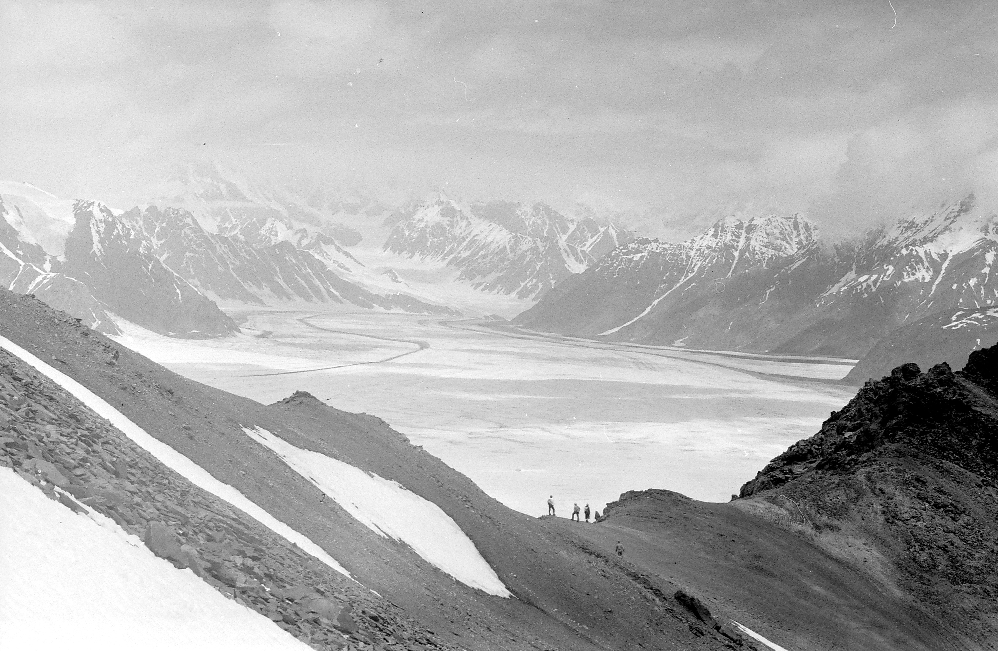 Ekspeditsioon mäetipule "Tartu Ülikool 350".